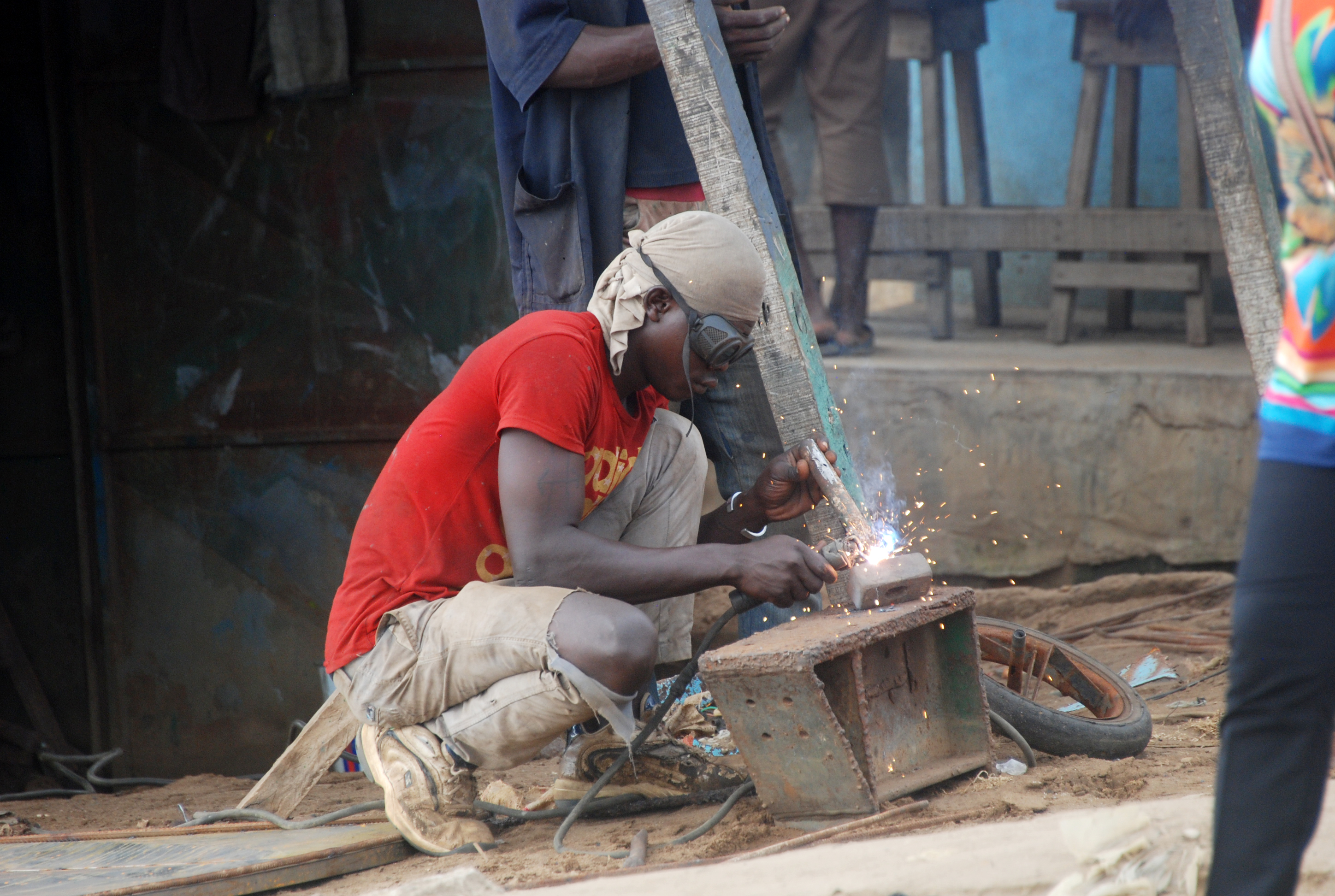 soudeur ivoirien en train de souder un marteau dans la ville d'Abidjan This is an image of "African people at work" from Ivory Coast